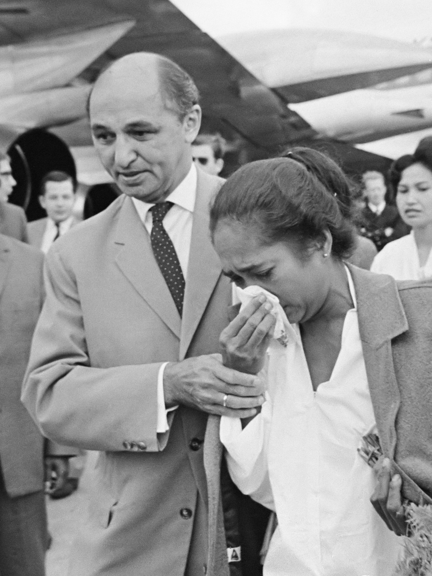 Aankomst mevrouw Soumokil op Schiphol, ondersteund door President Zuid-Molukkers, de heer J.A. Manusuma 26 juli 1966